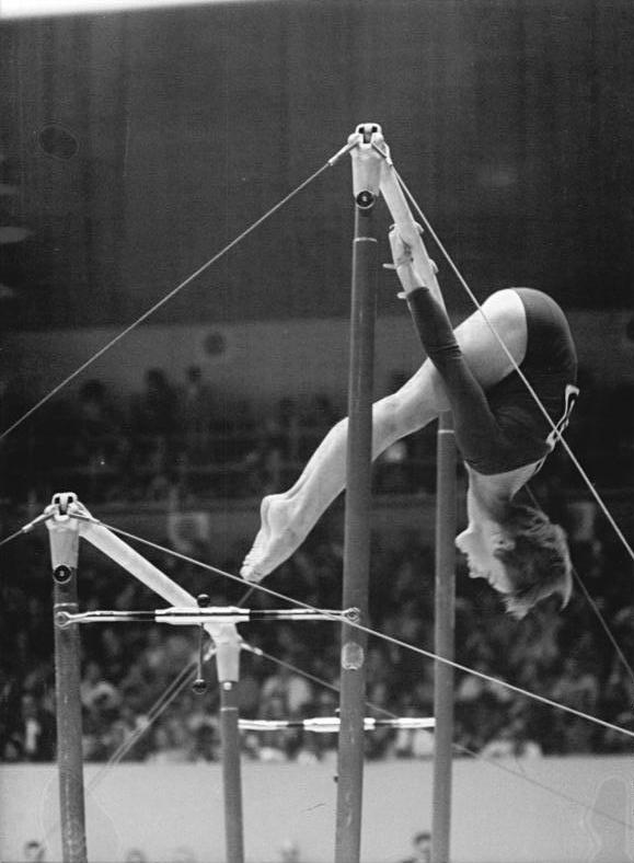 Zentralbild-Olympiadienst-Behrendt-Sche-Gr.-26.10.1968-Mexiko: XIX. Olympische Sommerspiele 1968 - Silbermedaille für DDR. Mit den Finalwettewerben an den einzelnen Geräten gingen am späten Abend des 25.10.68 vor 17 000 Zuschauer im restlos ausverkauften Auditorio Nacional die Olympischen Wettbewerbe der Turnerinnen zu Ende. Für die Mädchen aus der DDR wurde das glanzvolle Finale noch einmal zu einem schönen Erfolg, denn Karin Janz holte im Stufenbarren Olympisches "Silber", nachdem bereits im Achtkampf die Bronze-Medaille in der Mannschaftswertung errungen worden war. Damit wurden die Olympischen Spiele in Mexiko zu den bisher erfolgreichsten für die DDR-Turnerinnen."